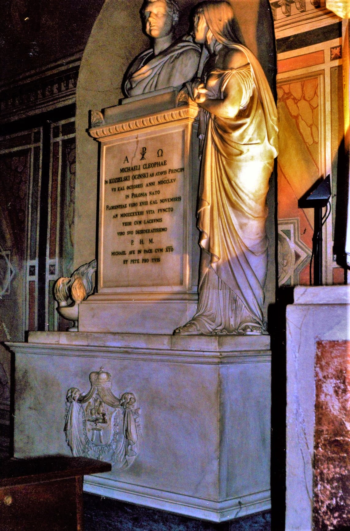 Michal Kleofas Oginski - grobowiec w bazylice Santa Croce we Florencji